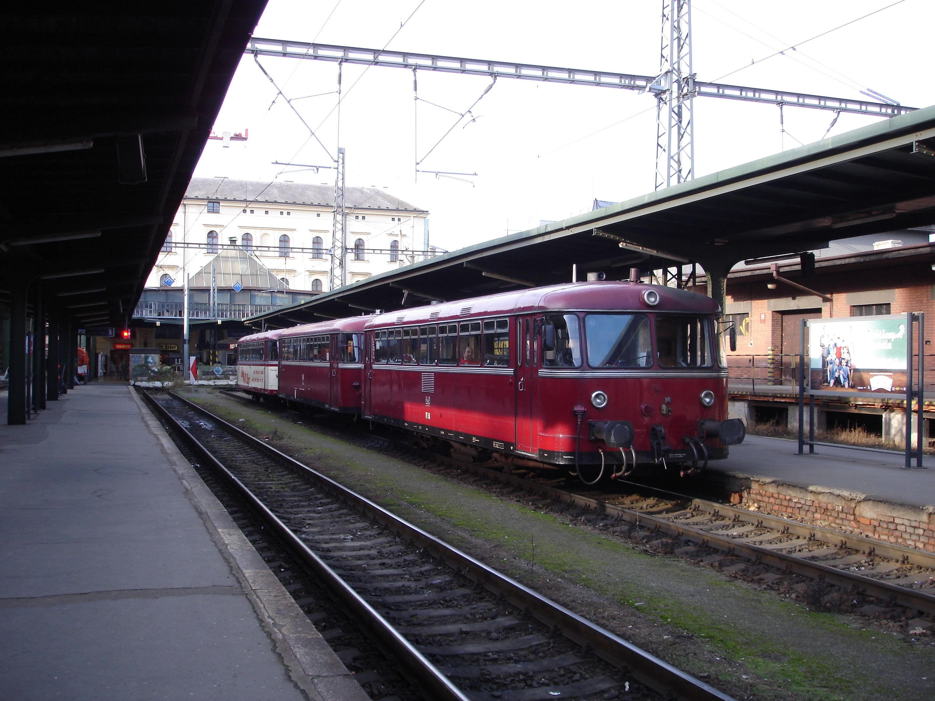 Zug der SBE im Bahnhof Praha Masarykovo nádraží